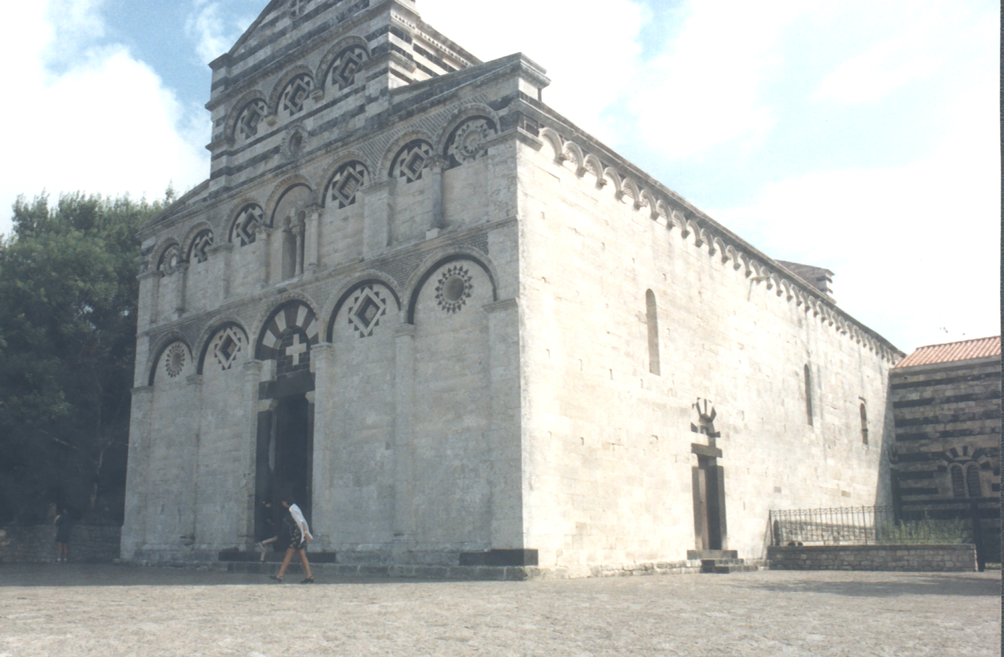 Abazia di San Pietro di Sorres (XII secolo), Borutta (SS), Sardegna